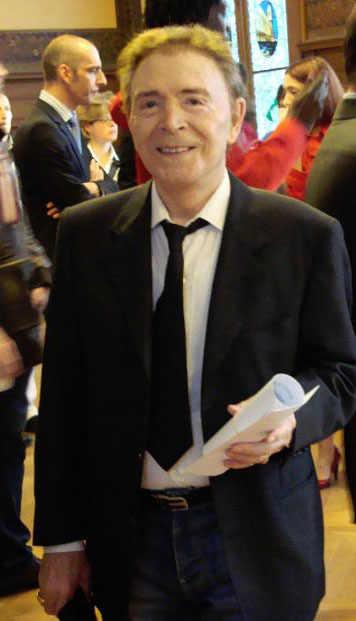 Pierre Guénin né le 19 février 1927 à Etampes est un journaliste cinématographique, artiste peintre, écrivain et militant LGBT (Lesbiennes, Gays, Bisexuels et Transgenres)